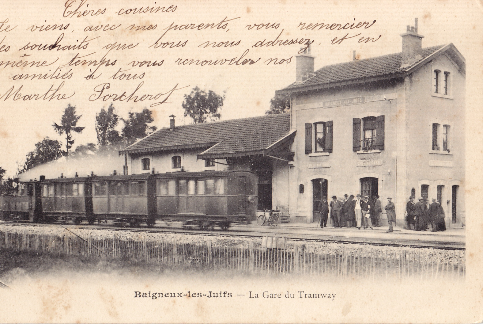 Carte postale ancienne sans mention d'éditeur : BAIGNEUX-LES-JUIFS - La Gare du Tramway